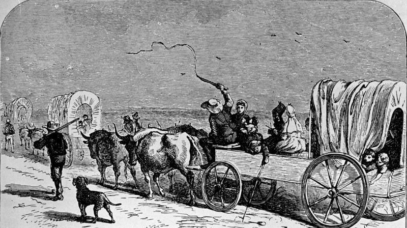 Zeichnung, Deutscher Einwandererzug in Texas Deutsche Einwanderer auf dem Zuge nach Neu-Braunfels. Neu-Braunfels in Texas, gegründet 1844 durch den Mainzer Adelsverein.